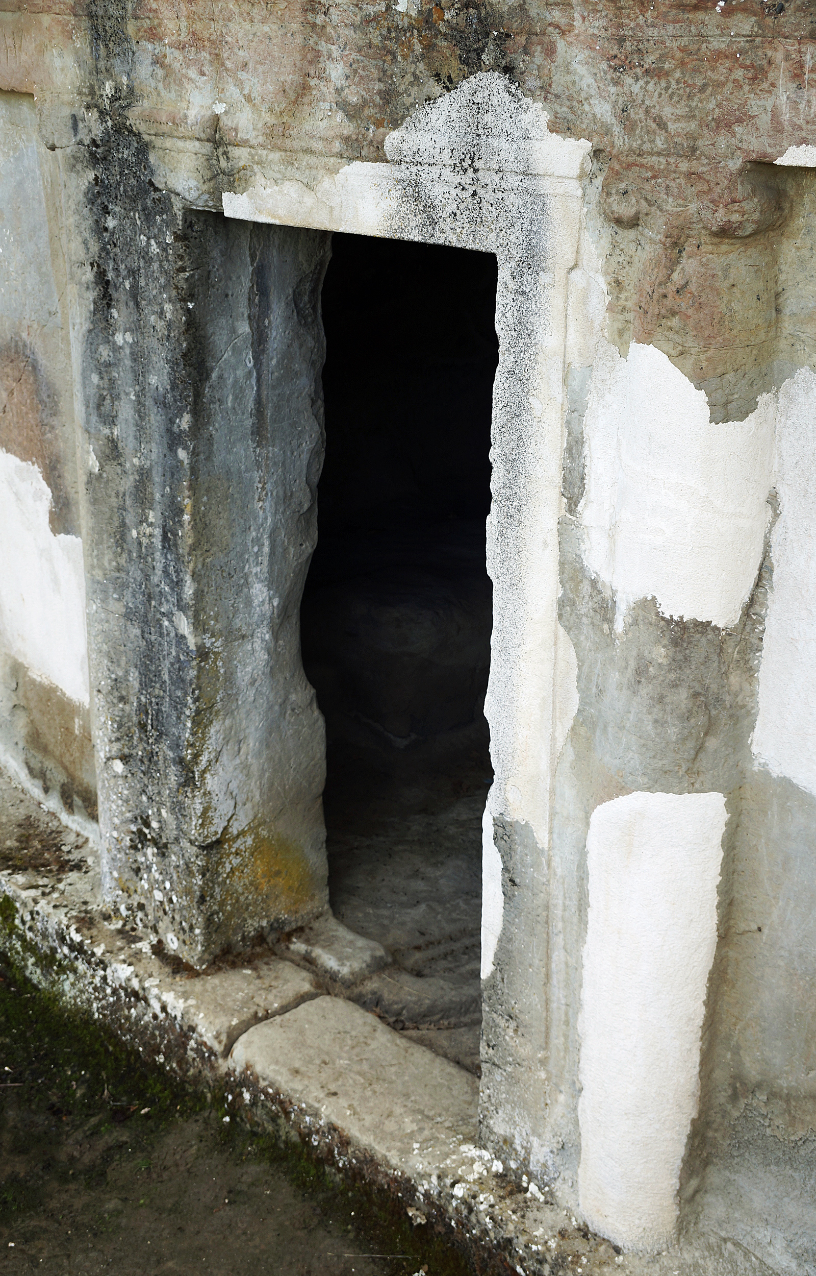 Selca e Poshtmë, Albania: entrance to tomb 1